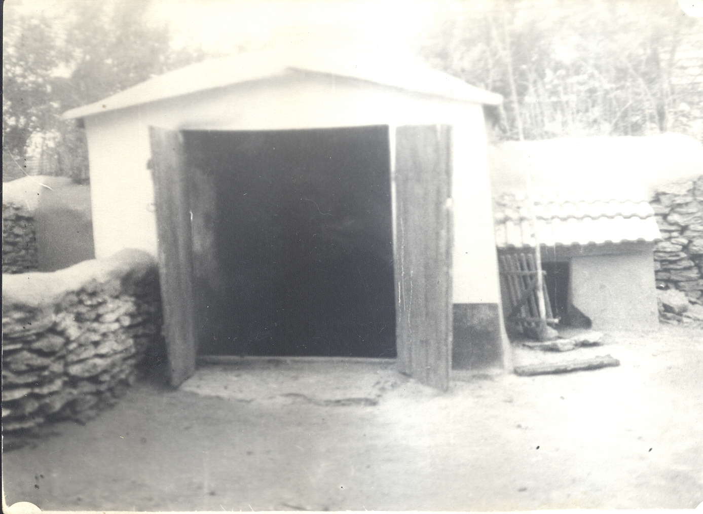 Підвал, у якому у 1924 році 5 діб без їжі і води тримали заарештованих учасників Татарбунарського повстання. 32 з них задихнулись, 4 були вбиті жандармами.